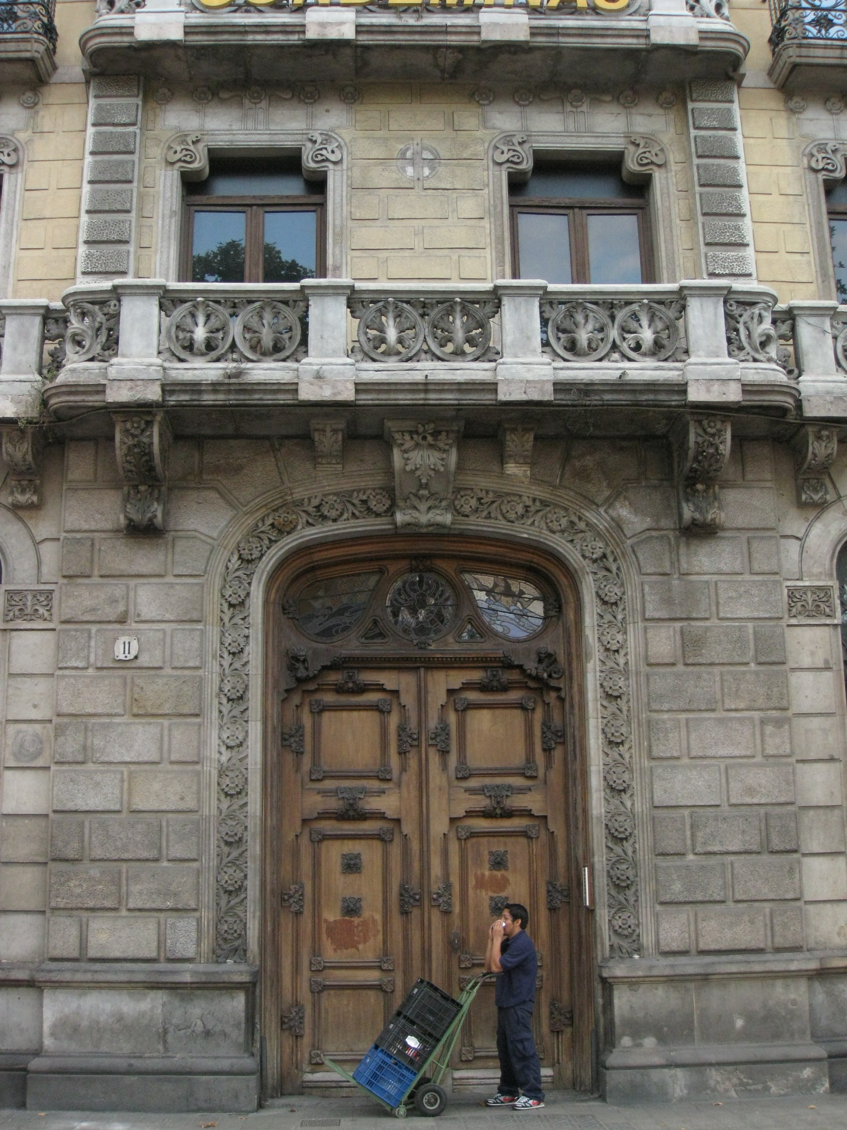 Edifici Condeminas (1915), al núm. 11 del passeig de Colom i façana anterior al carrer de la Mercè (1860), al barri Gòtic de Barcelona. Portal del passeig de Colom.